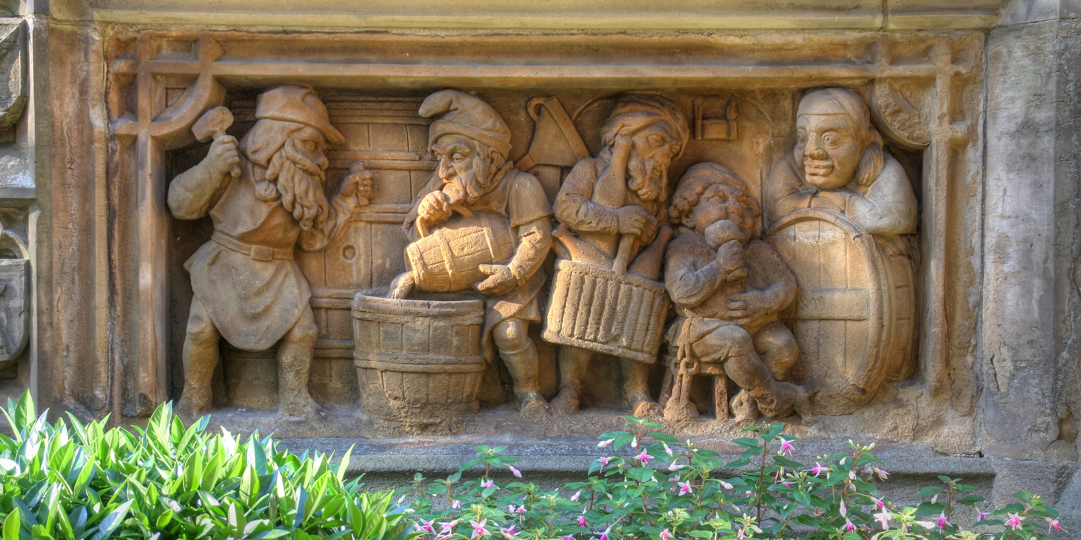 Heinzelmännchenbrunnen in Köln. Detail. Künstler: Edmund und Heinrich Renard. This is a photograph of an architectural monument.